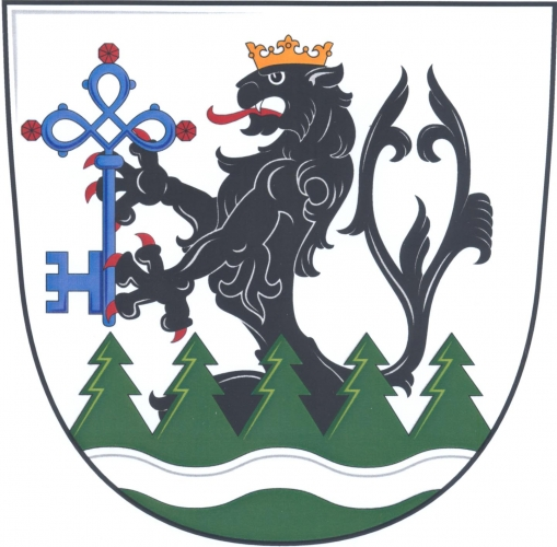 Znak, Petrov nad Desnou, okres Šumperk